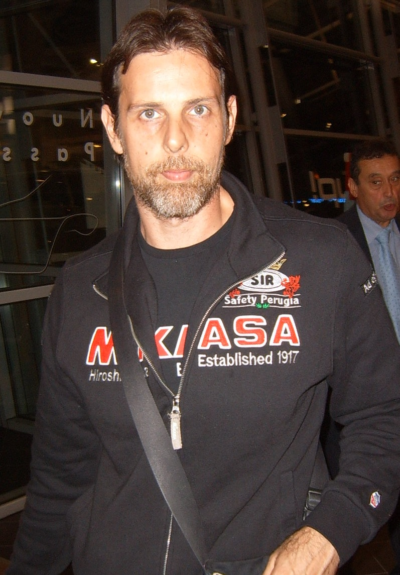 Presentazione Sir Safety Umbria Volley 2013-2014